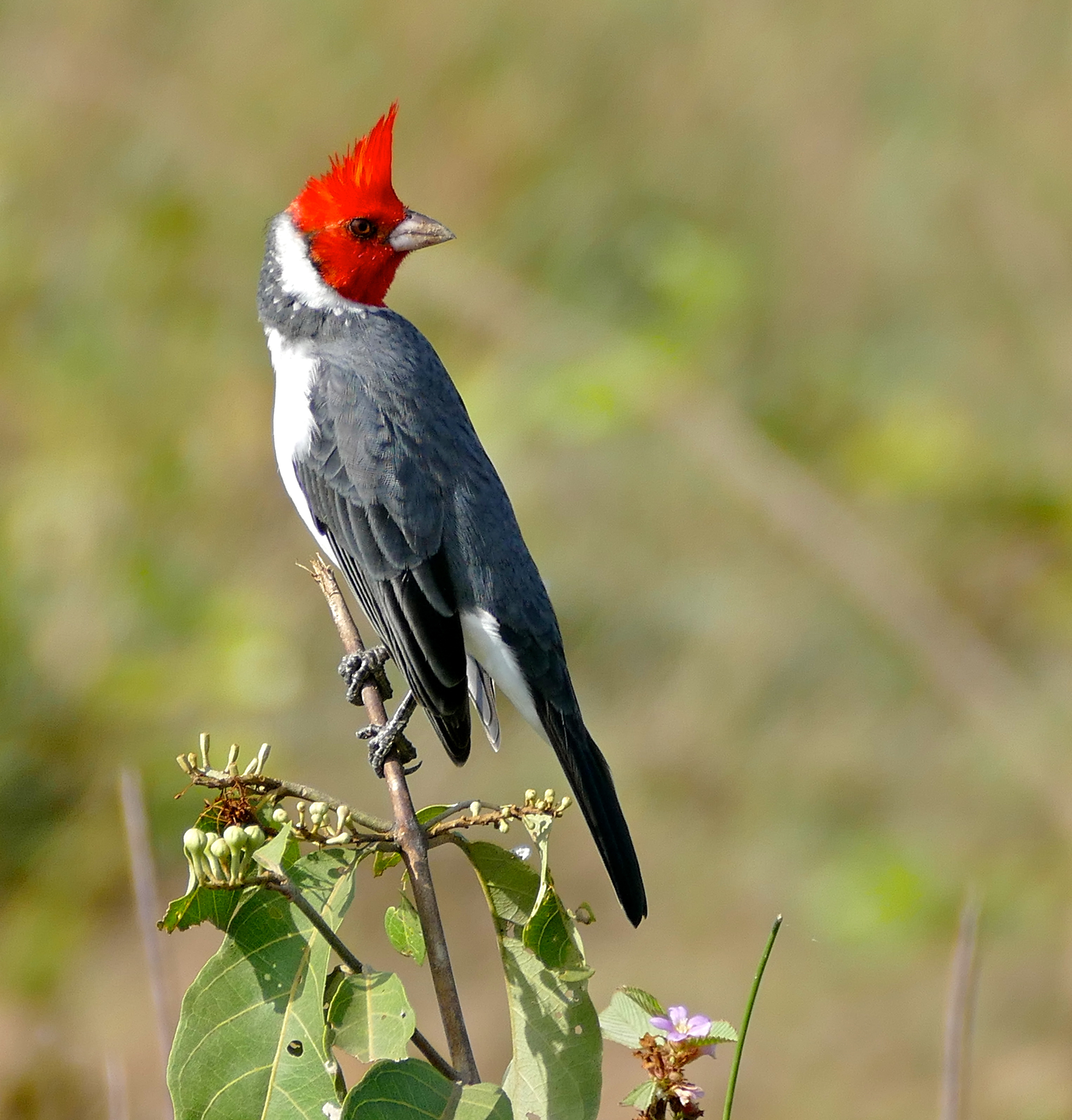 Transpantaneira, Poconé, Mato Grosso, BRAZIL